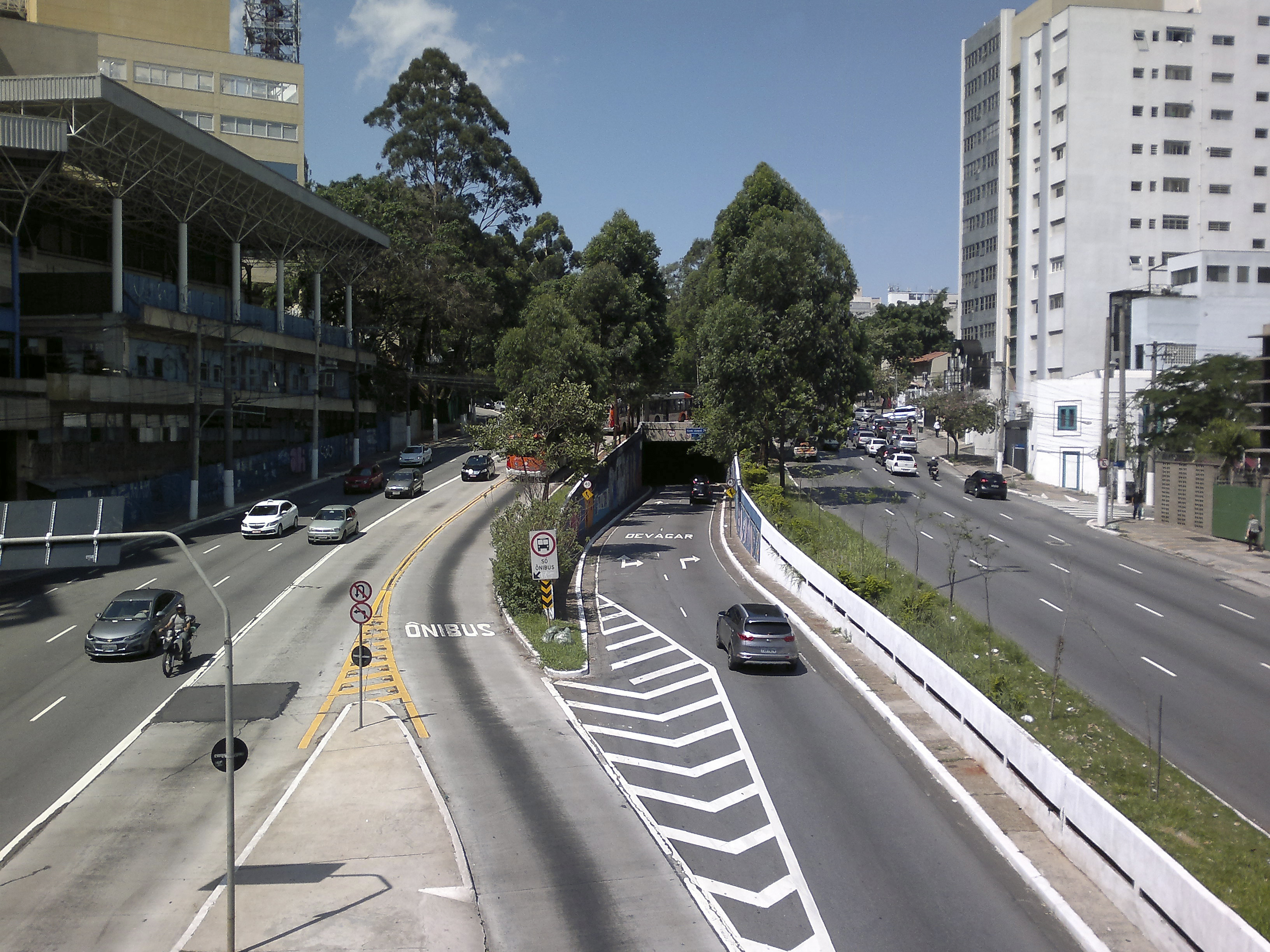 Avenida Rebouças, Tunel, São Paulo, Brasil